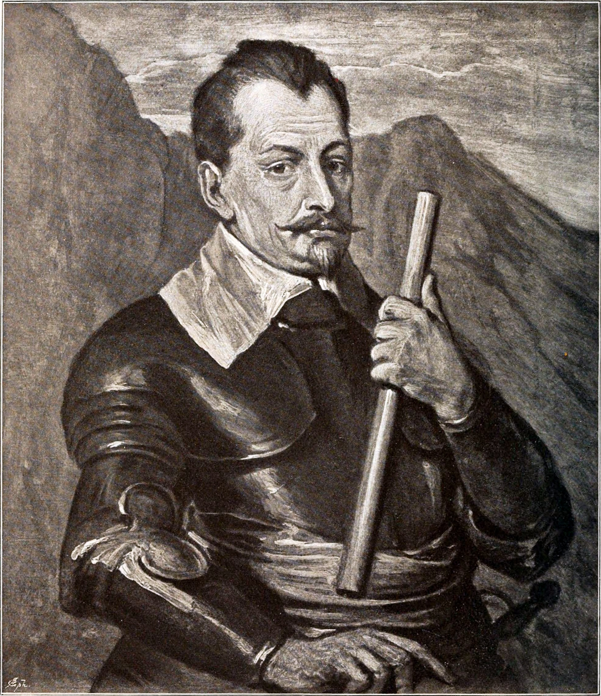 Beschreibung aus Schulze, 1898. Wallenstein und die Zeit des dreissigjährigen Krieges. Anton von Wallenstein. Gemälde von Anton van Dyck in der alten Pinatothek zu München. (Nach einer Originalphotographie von Franz Hanfstängl in München)